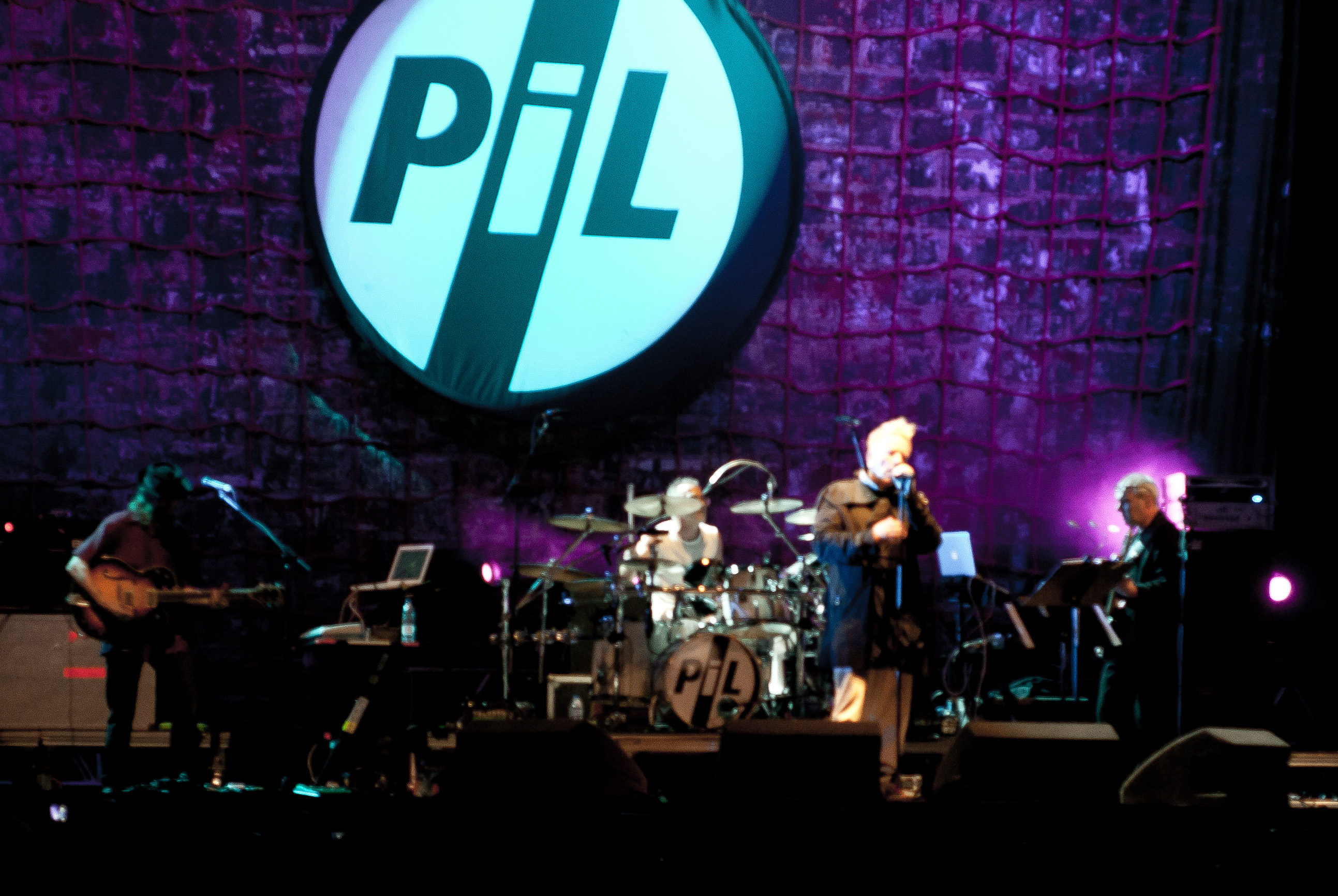 P.I.L.